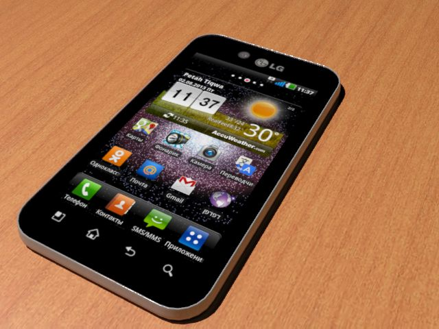 LG Optimus Black P970 3d визуализация